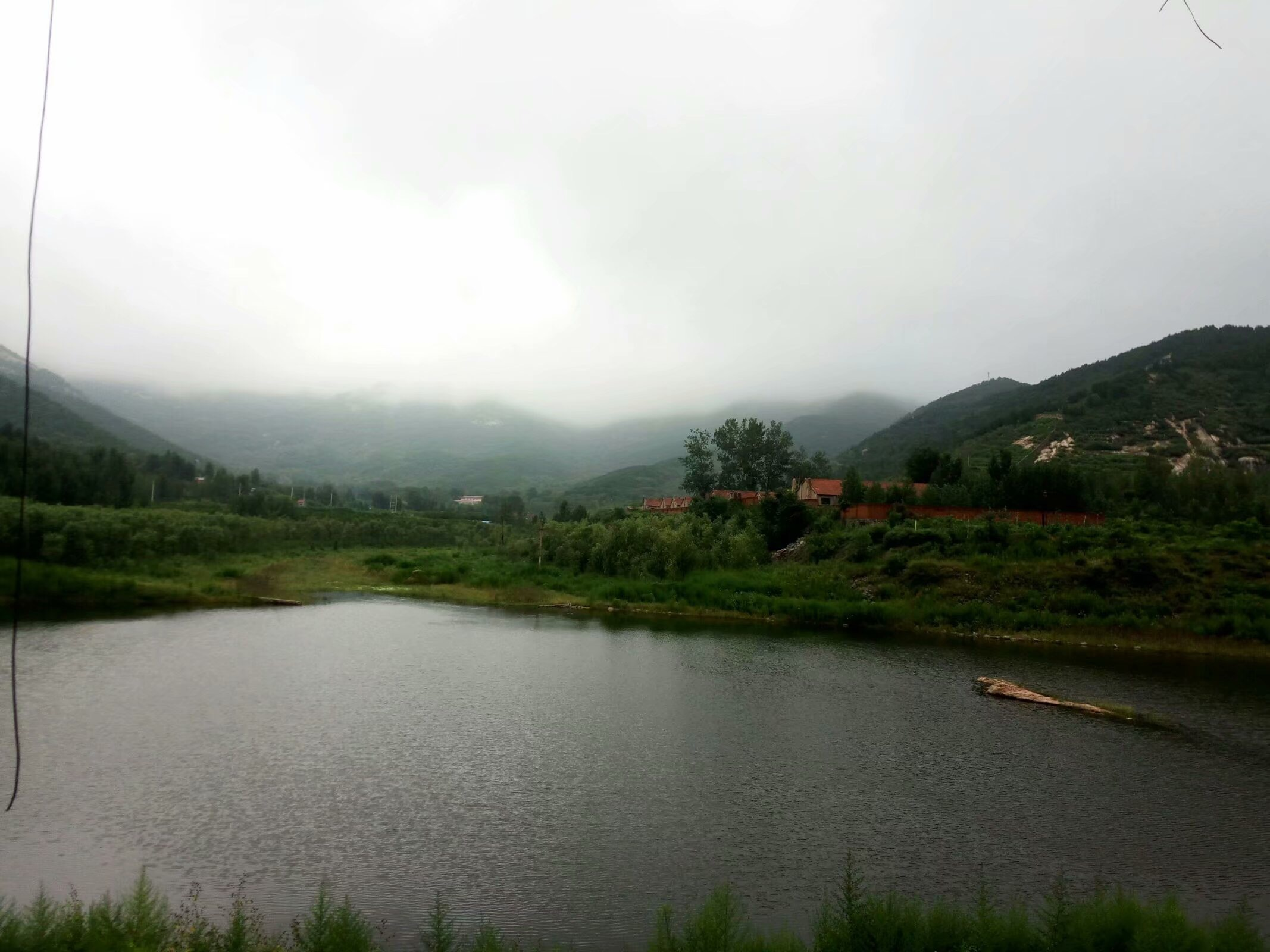 中文（中国大陆）: 肥城市牛山森林公园照片